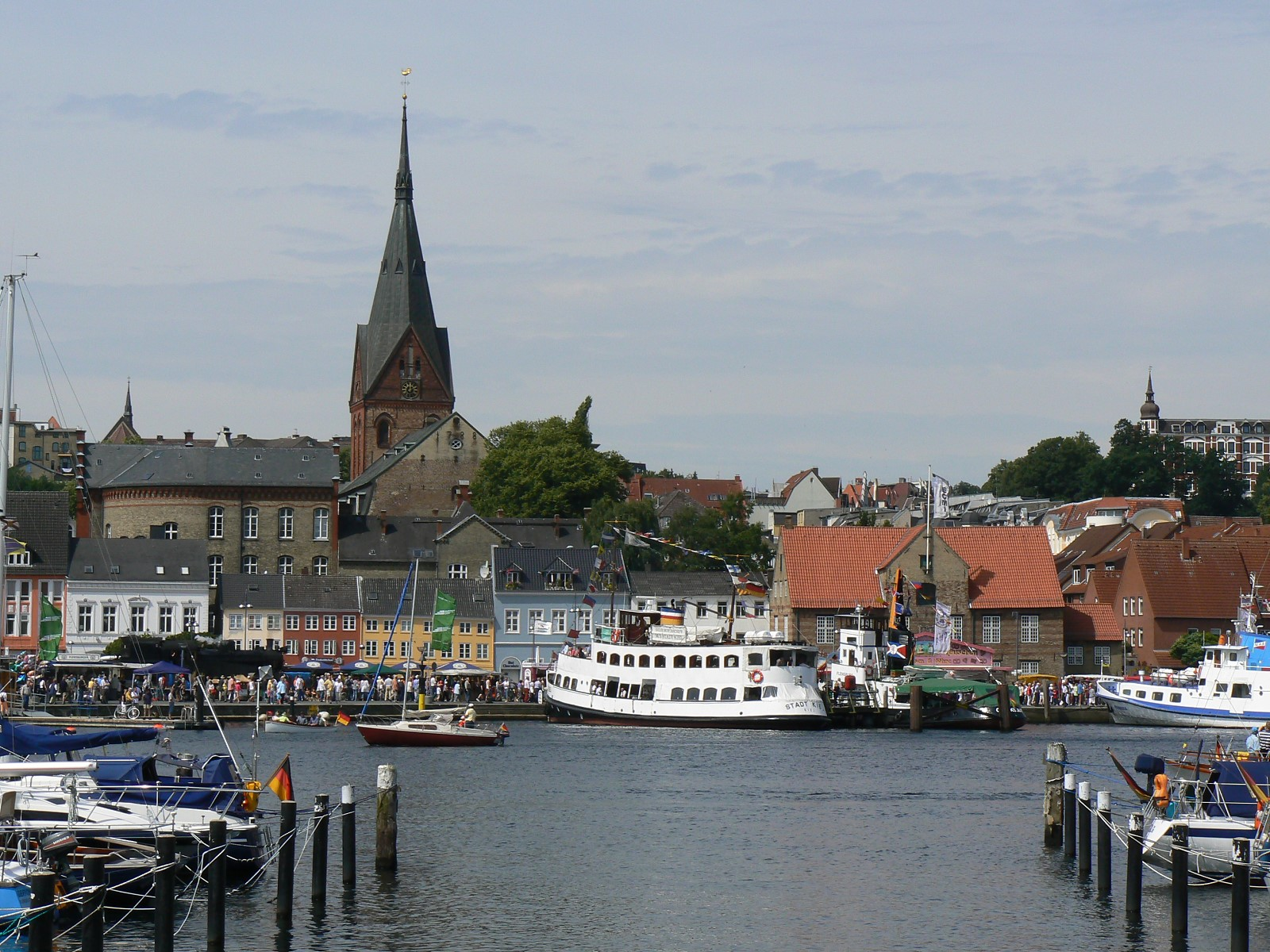 Blick über den Flensburger Hafen. Im Hintergrund: die St. Marien Kirche.